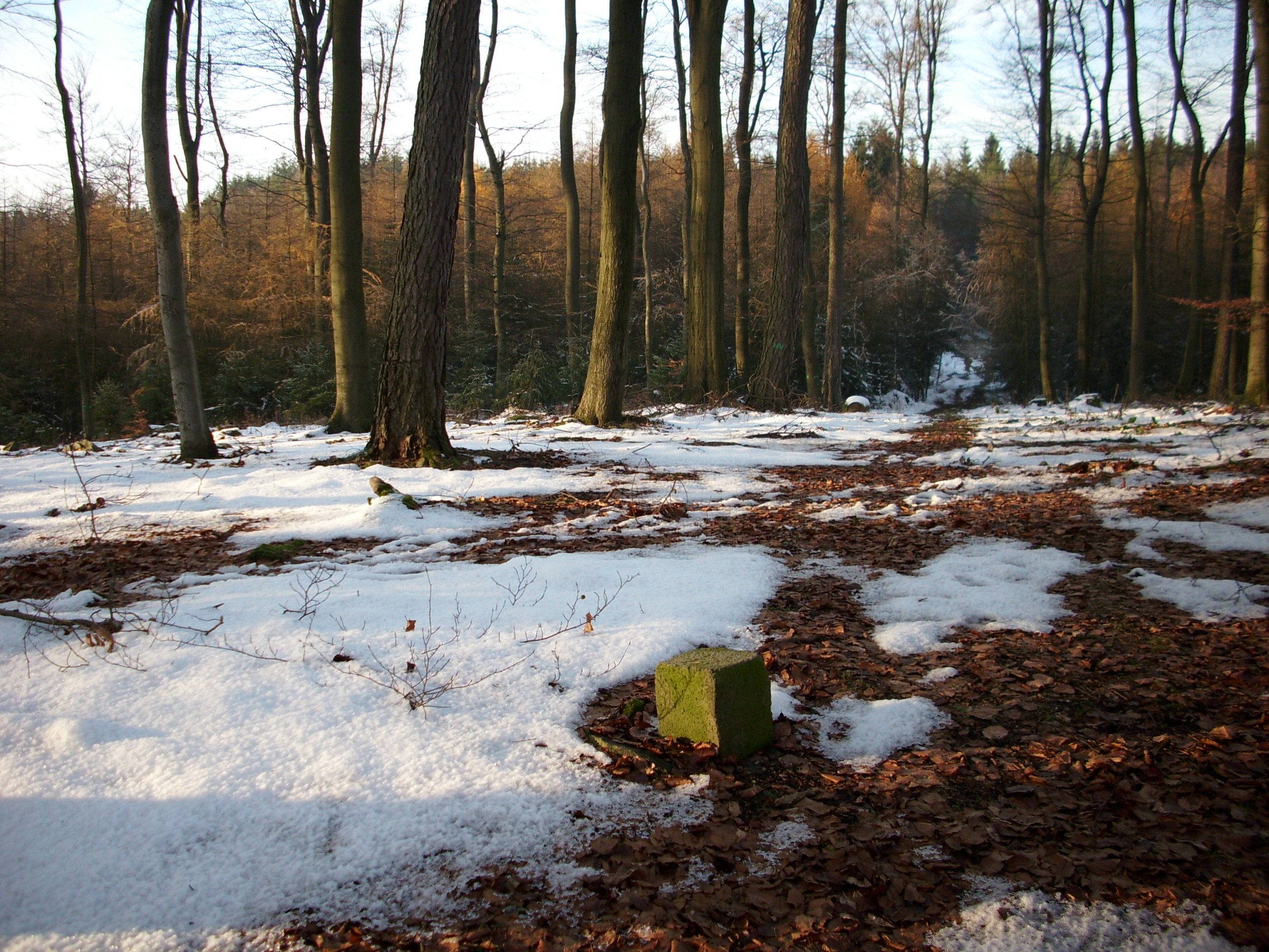 Markierungsstein auf dem Buchwaldskopf 492,0 m im Taunuskamm oberhalb von Oberjosbach